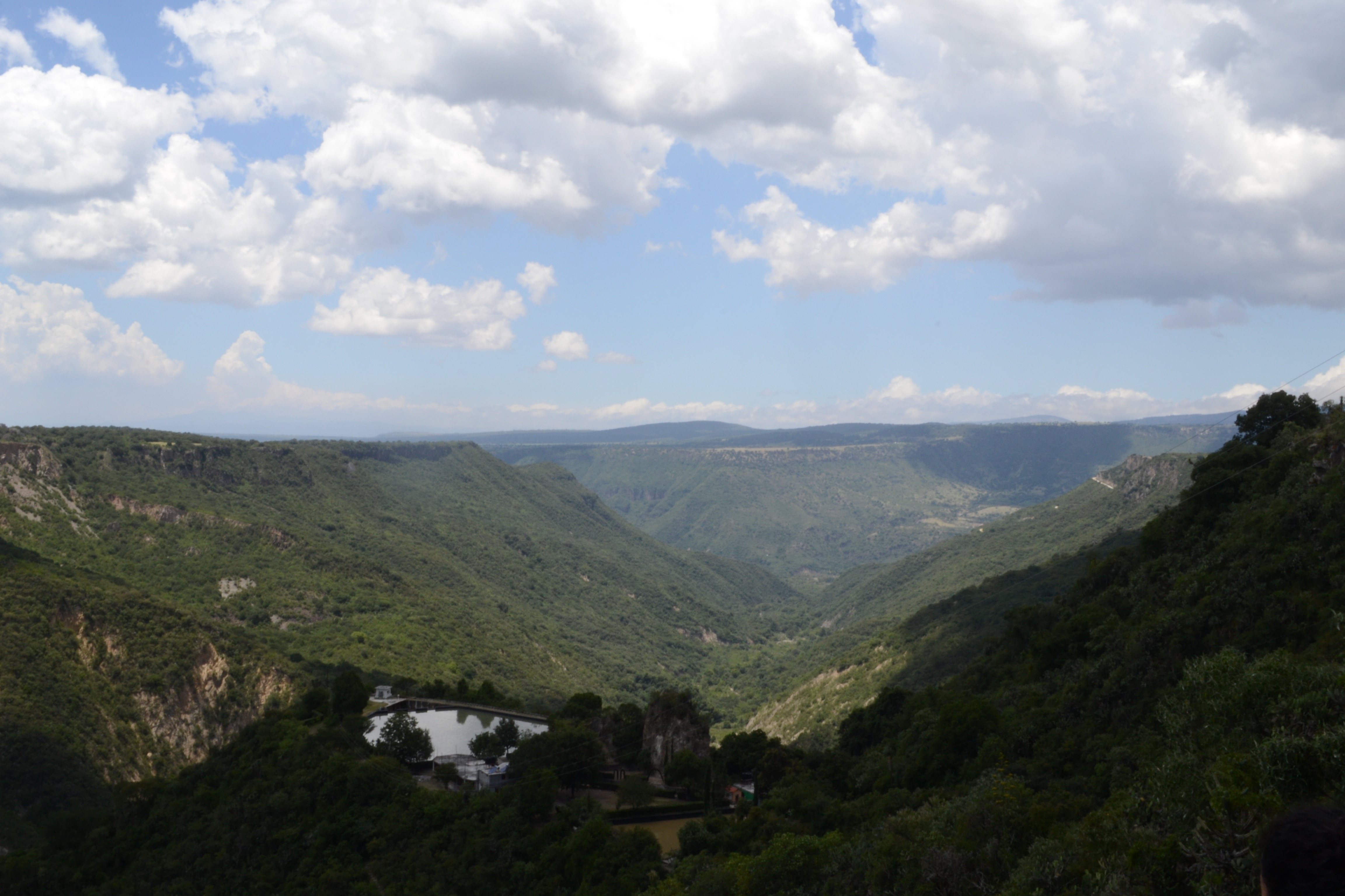 Fotografía de la vista desde la Barranca de Aguacatitla